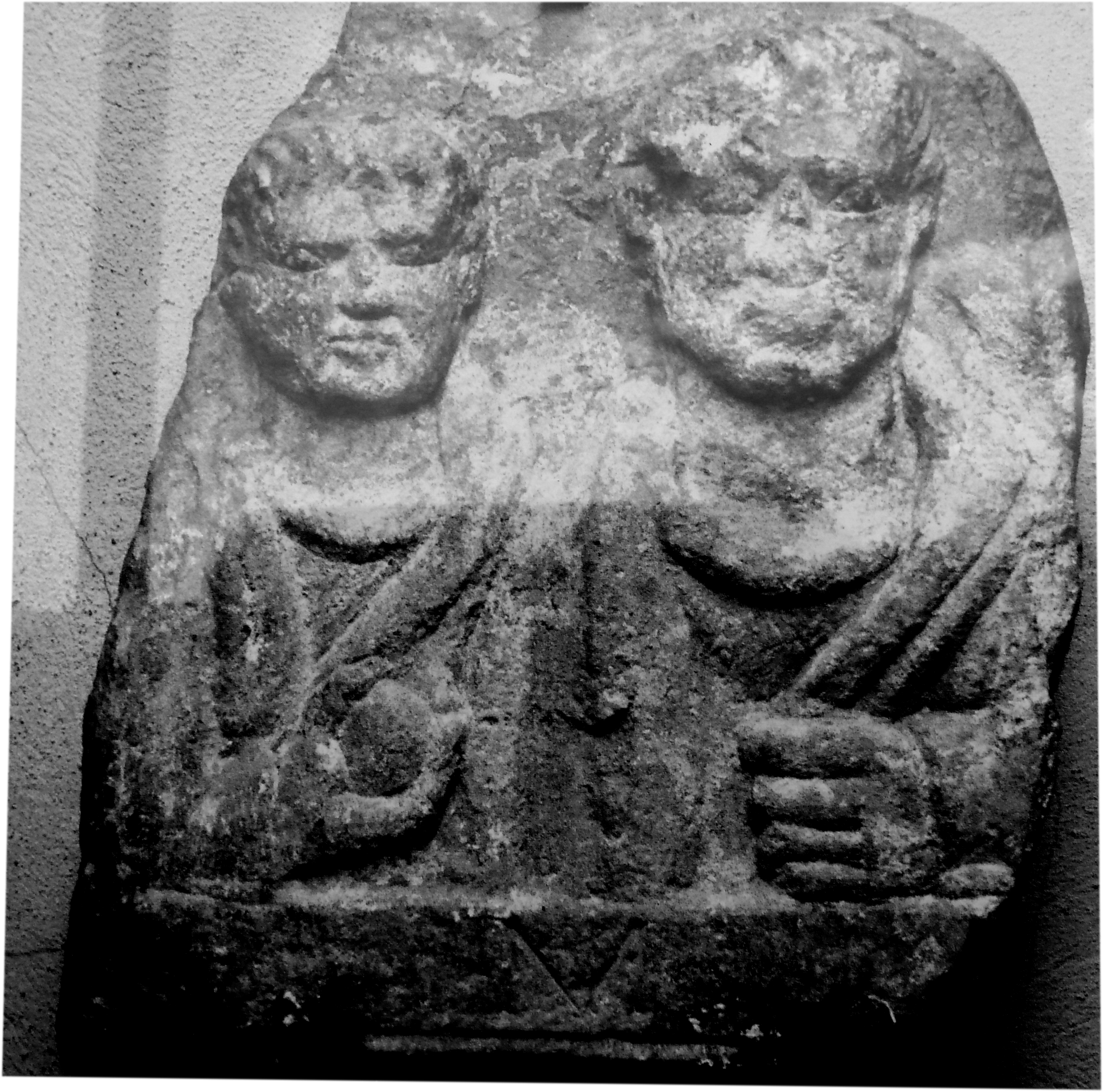 Römerzeitliches Grabrelief, Pfarrkirche Ybbs/Donau, Österreich.